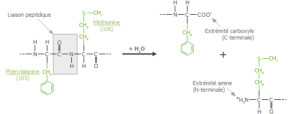 Hydrolyse de la caséine Kappa, qui est une protéine présente dans le lait.